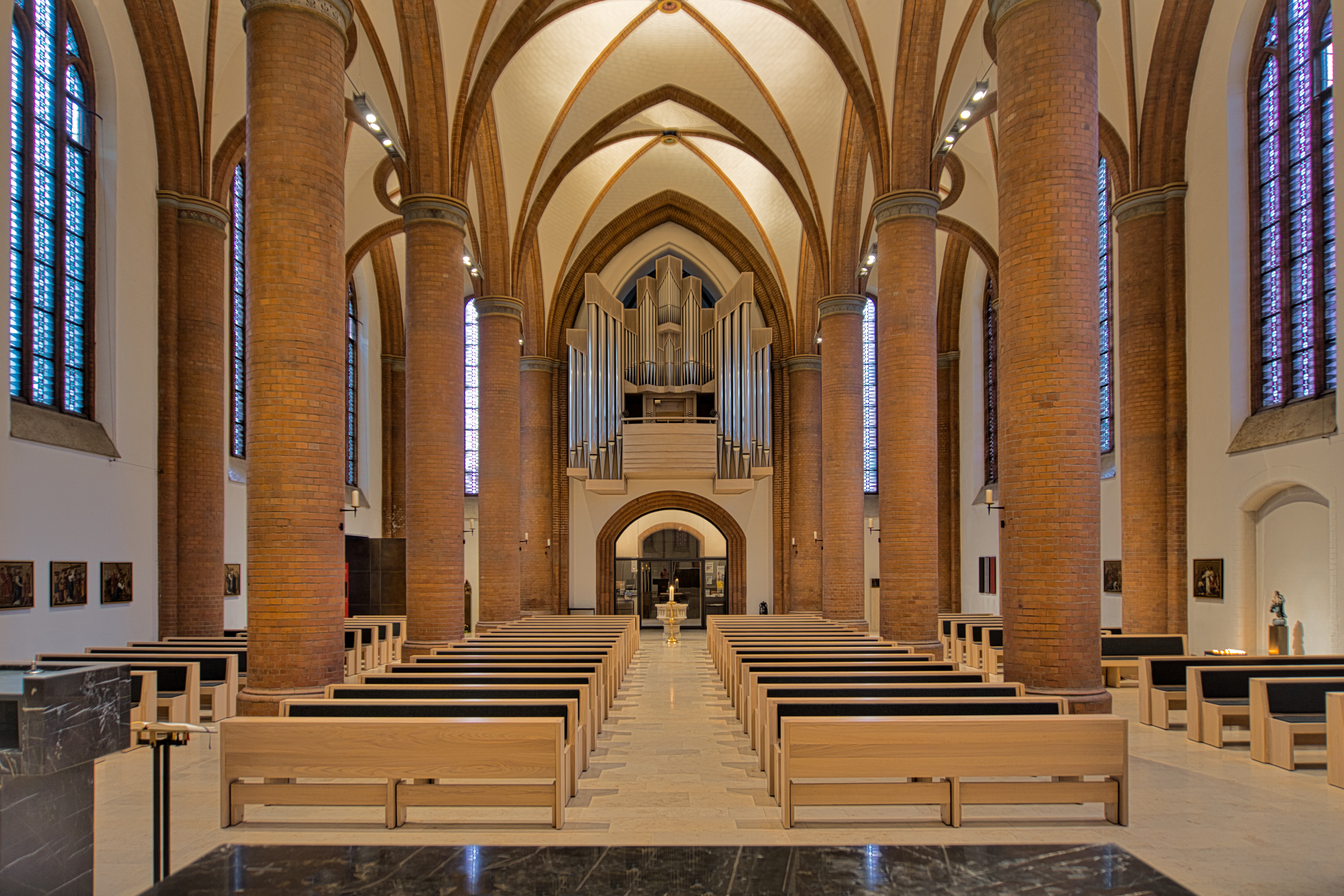 Herz-Jesu-Kirche in Lübeck; Blick vom Altar Richtung Osten (in dieser Kirche steht der Altar ungewöhnlicher Weise im Westen)